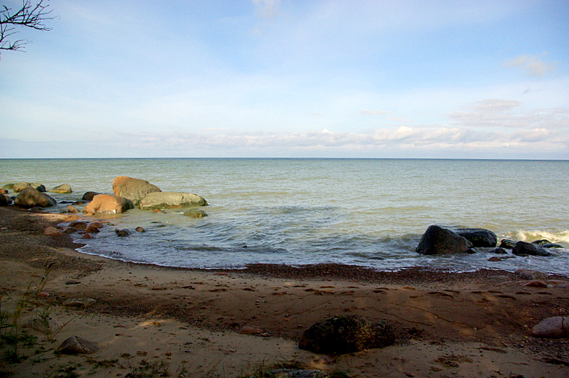 Utria kalarand